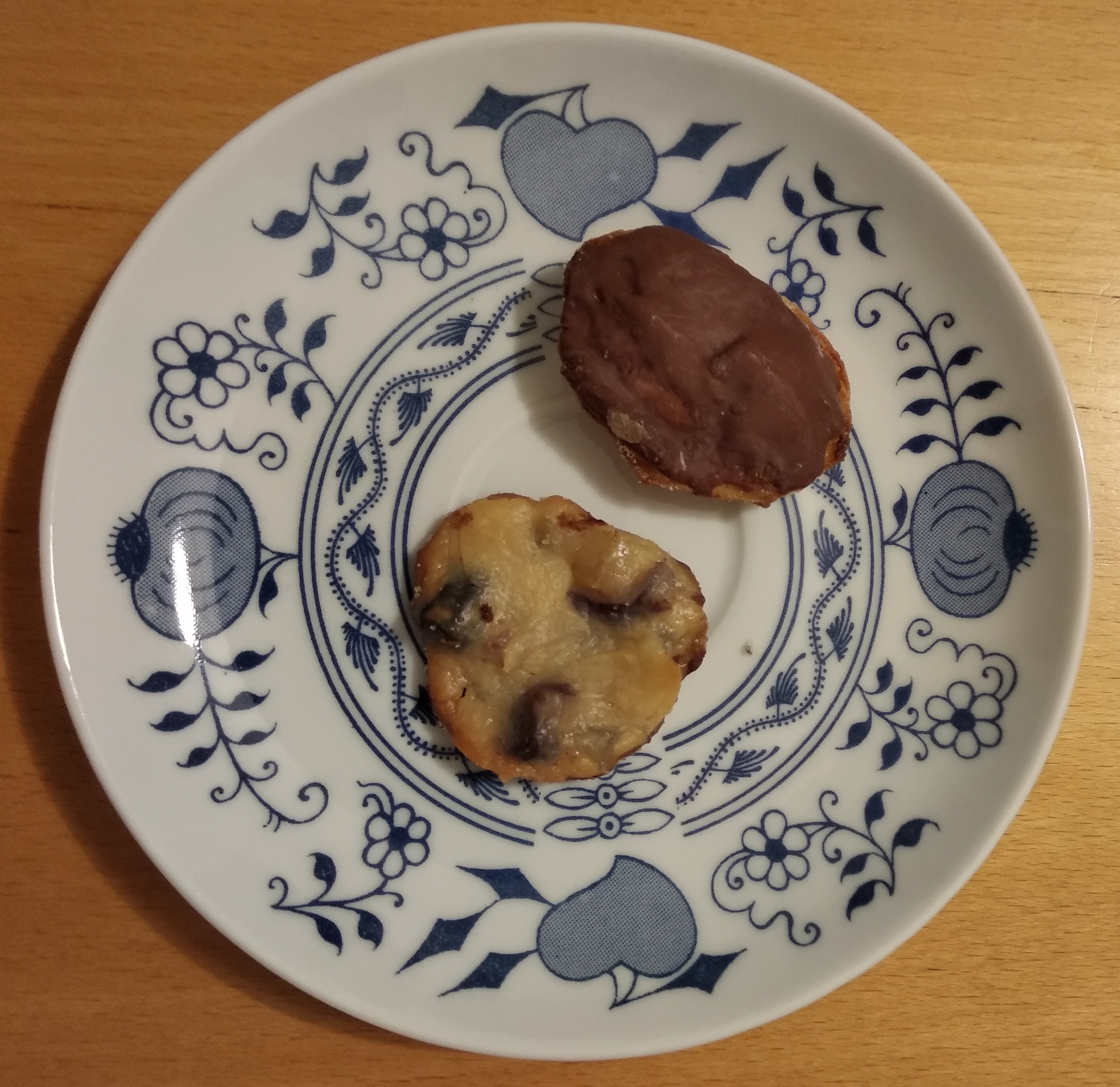 Marokánky